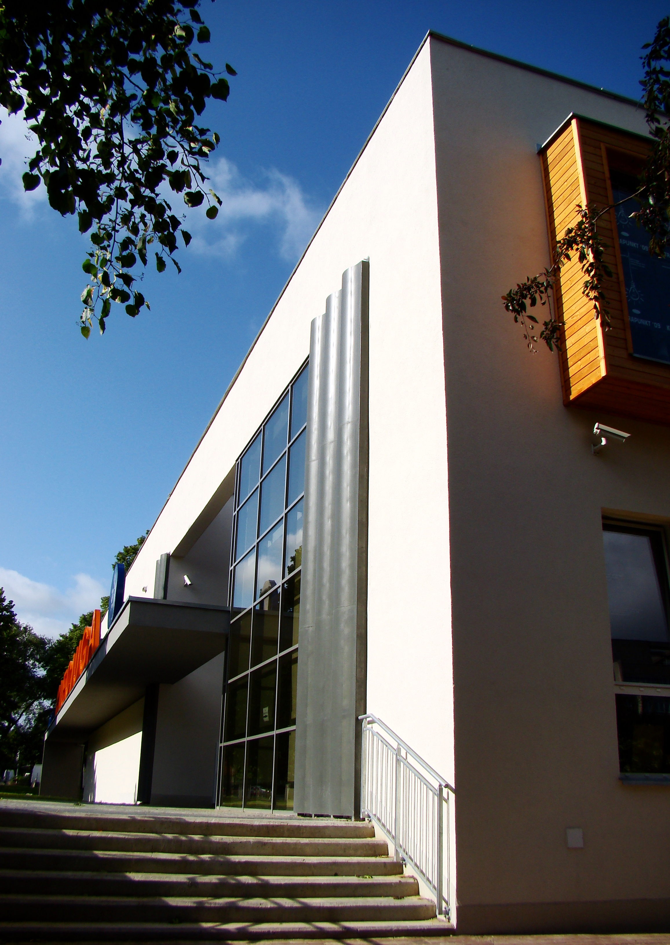 Teatr Lalek Pleciuga, Szczecin, Polska